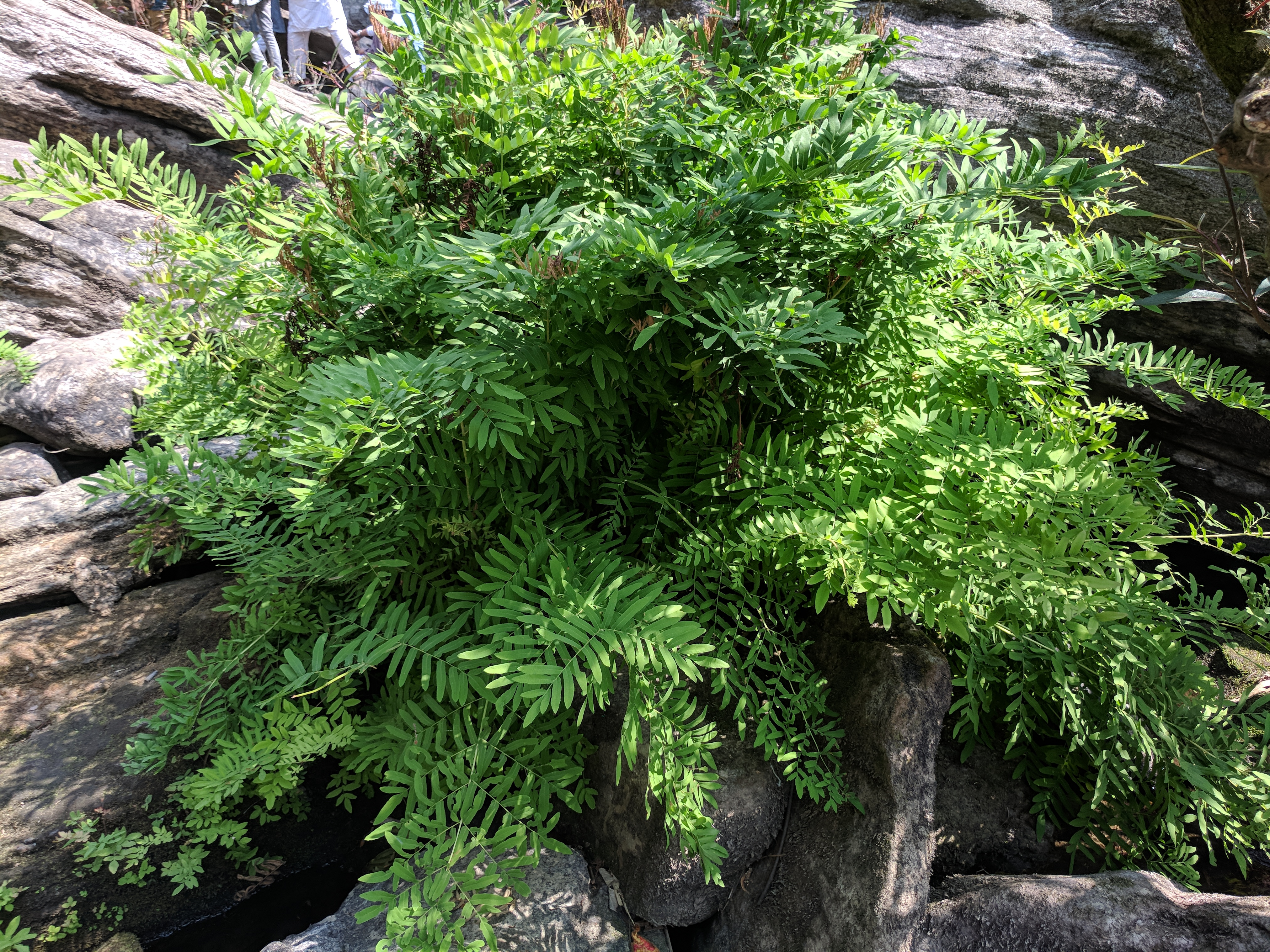 Kakkayam